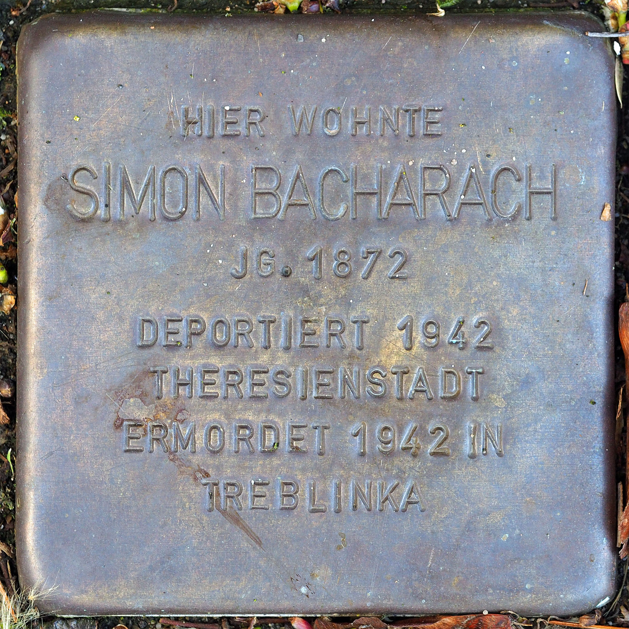 Stolpersteine MG: Bacharach, Simon